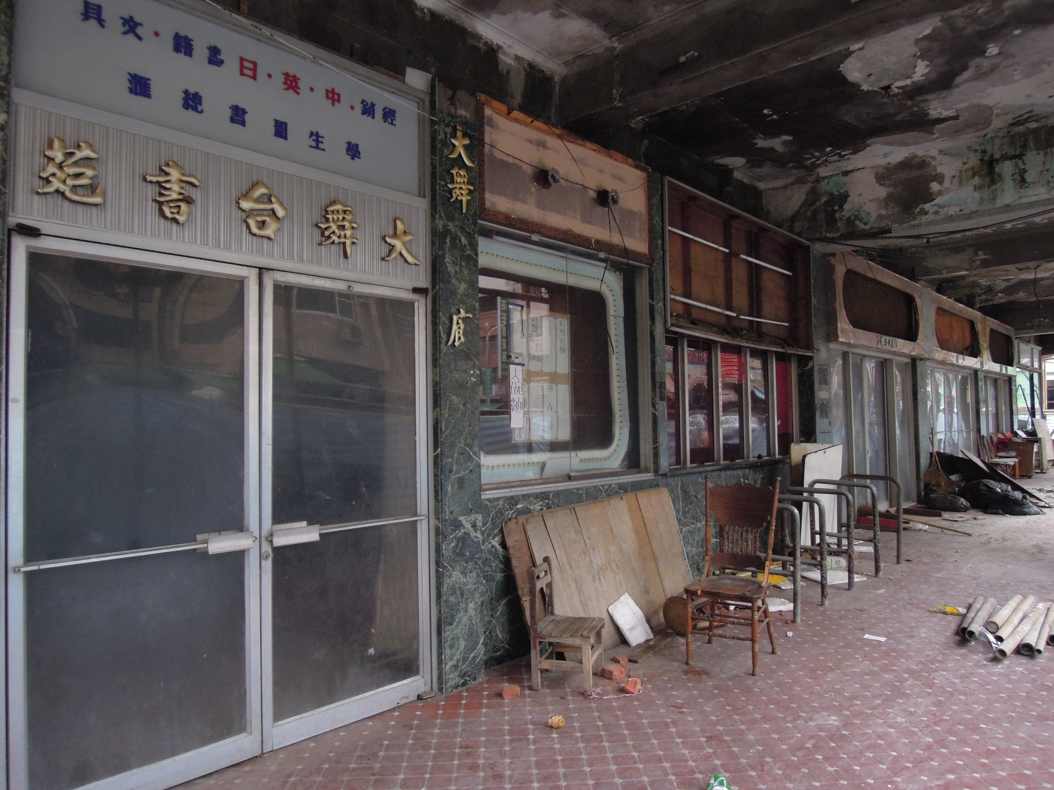 中文（台灣）: 大舞台戲院的騎樓與大舞台書苑入口。